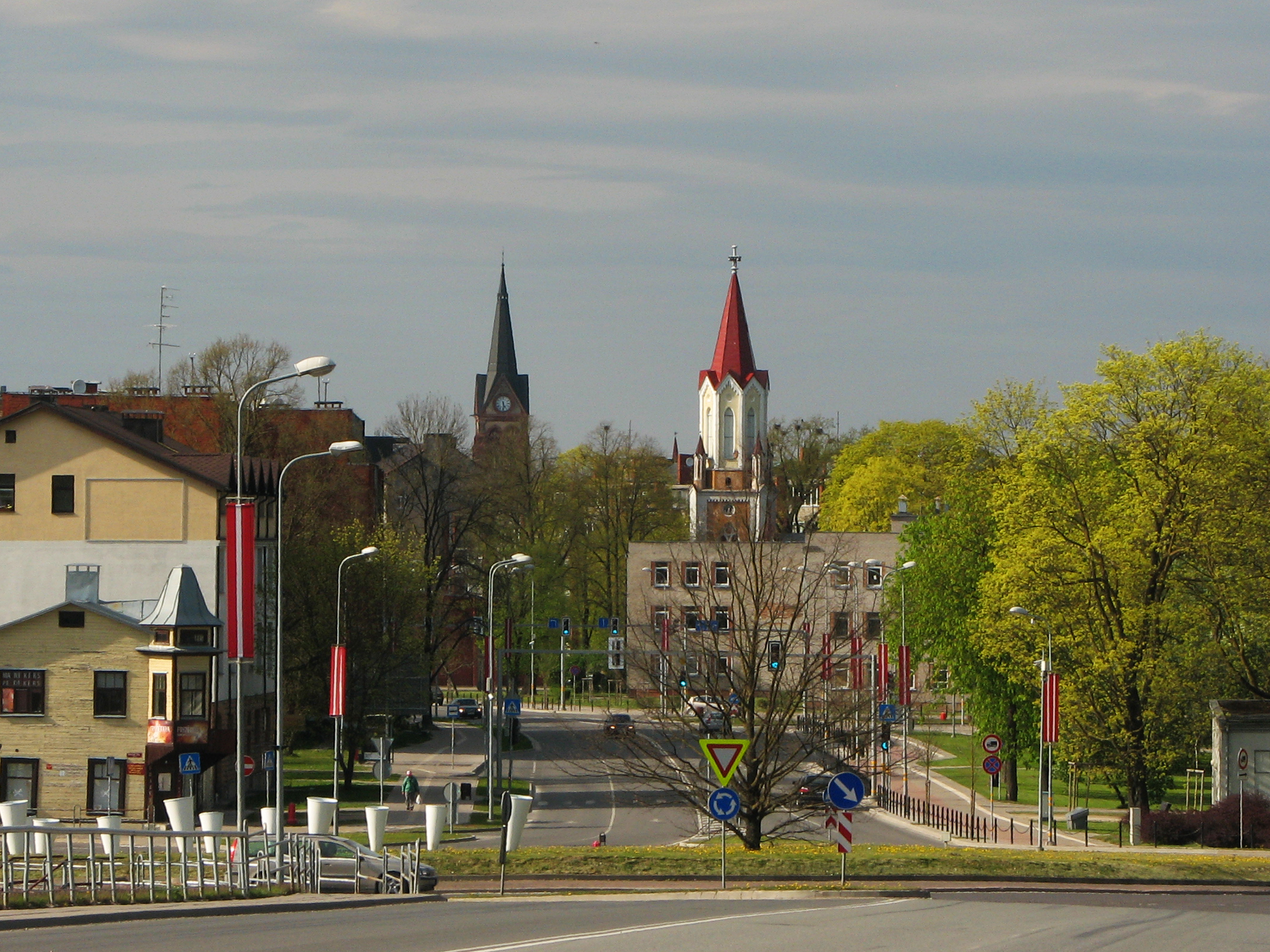 Jelgava, Latvia